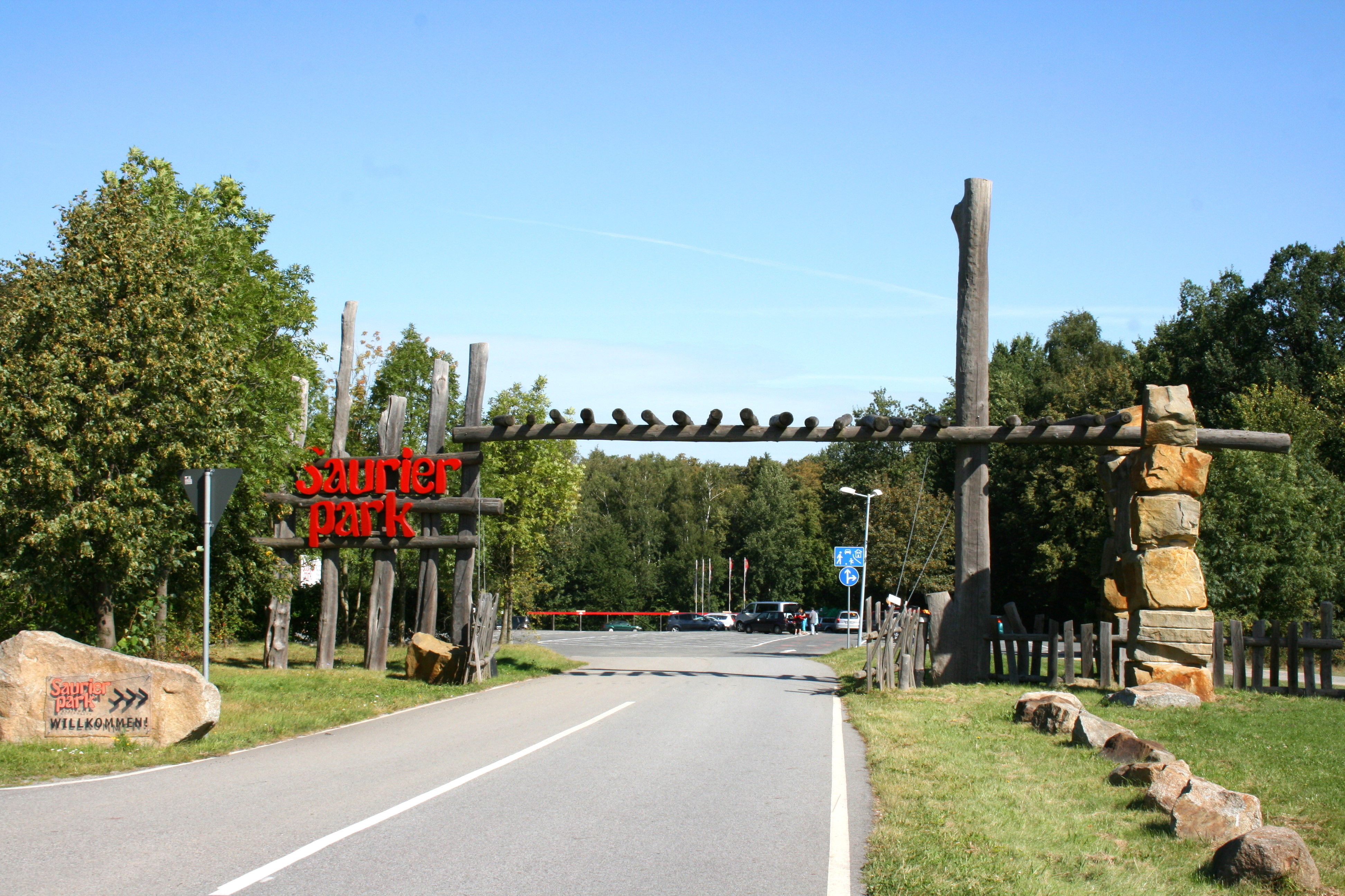 Saurierpark in Bautzen-Kleinwelka